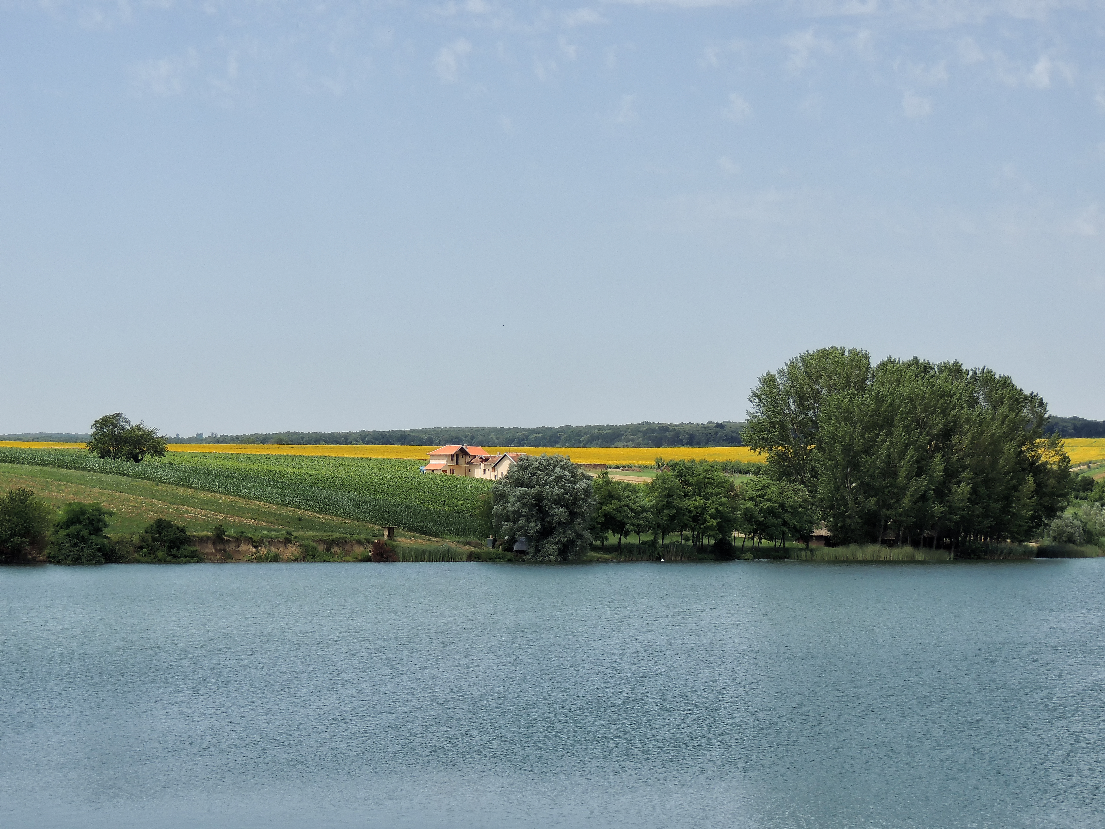 Srpski (latinica): Ово је фотографија заштићеног природног добра у Србији под шифром: HП01 This is a a photo of a natural area in Serbia with ID: HП01 Moharačko jezero i polja suncokreta kraj Erdevika na proplancima Fruške gore.